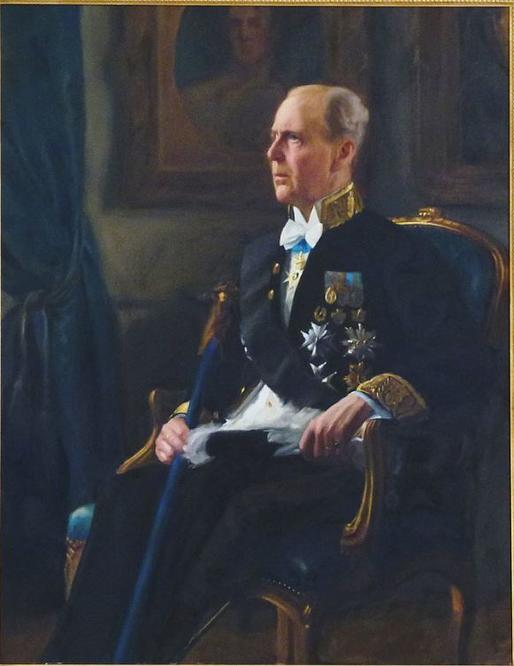 Reinhold H.J. Rudbeck 1871-1957 i Edsbergs slott målning är en kopia efter Bernhard Österman (1870-1938)